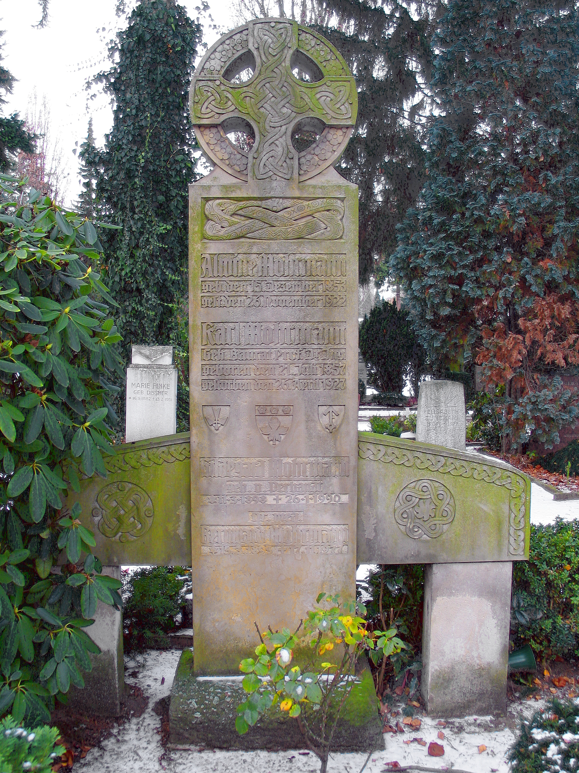 Grabmal von Alwine (1853-1922), Karl Mohrmann (1857-1927), Geh. Baurat Prof. Dr. Ing., Hildegard geb. von Perbandt (1898-1990), Bernward (1895-1977) auf dem Neuen St. Nikolai-Friedhof in Hannover nahe der Appelstraße...